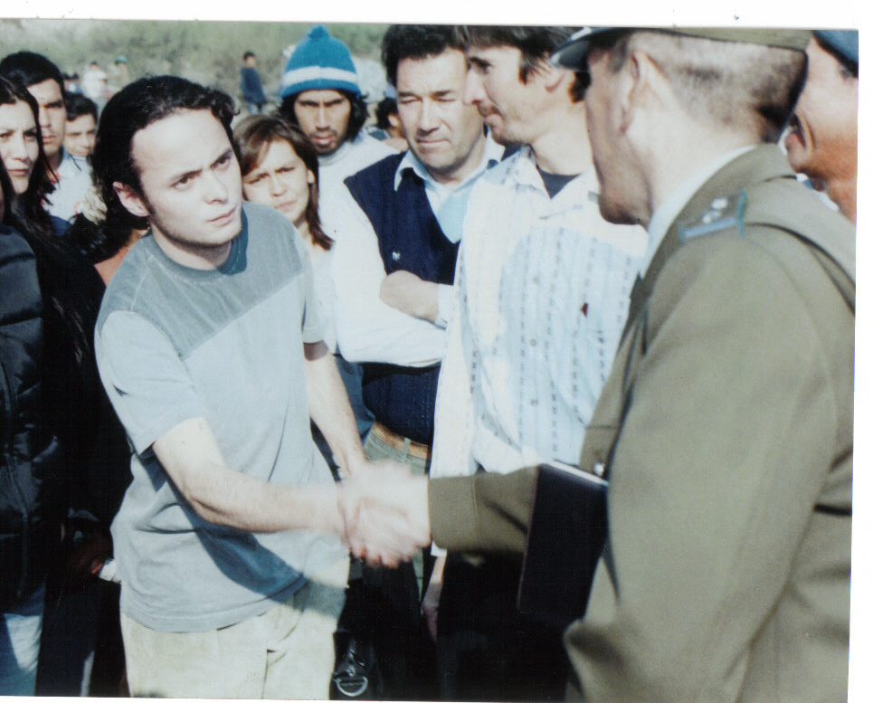 Nicolás Pavez en la localidad de Las Canteras, dialogando con Carabineros en medio de una manifestación de los canteros.